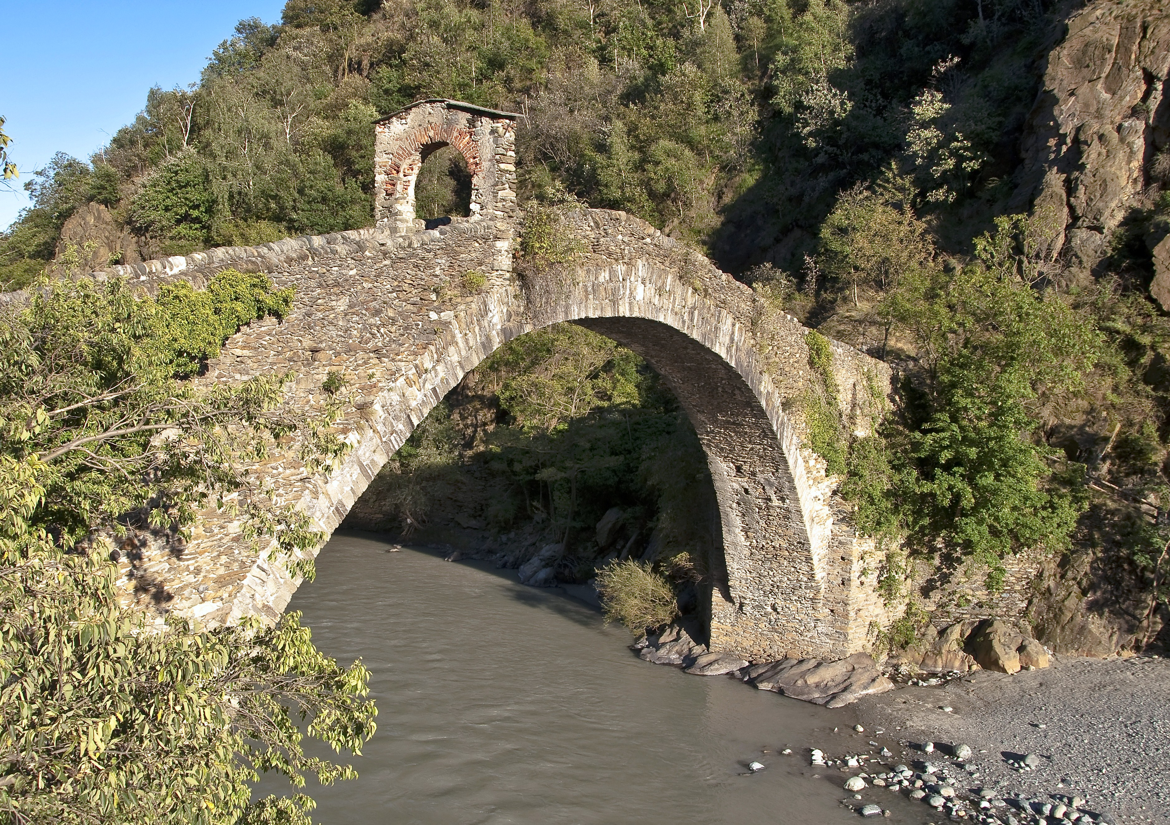 Ponte del Diavolo (Lanzo Torinese). Il ponte del Diavolo fu edificato nel 1378,serviva a collegare Lanzo e le sue valli con Torino superando la Stura e permettendo così di evitare il passaggio da Balangero, This is a photo of a monument which is part of cultural heritage of Italy.